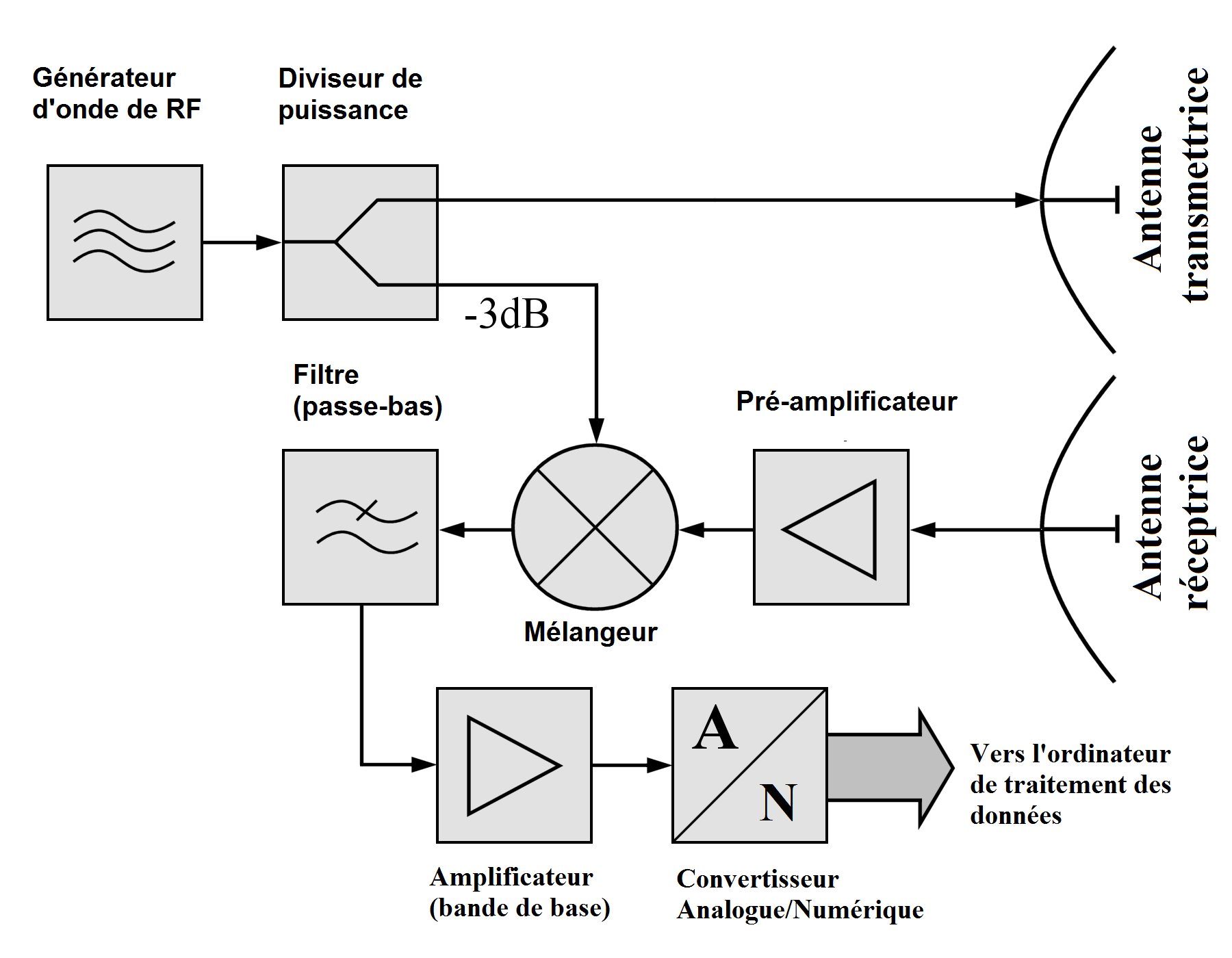 Diagramme d'un circuit simple de radar à onde entretenue